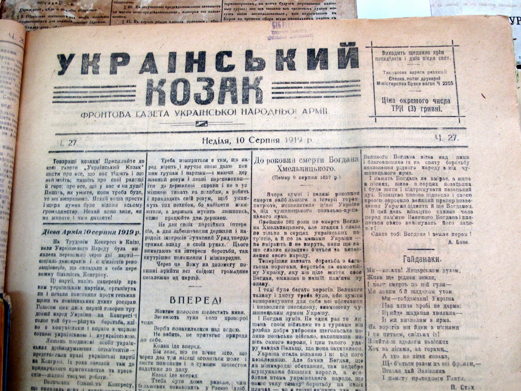 Газета Український козак